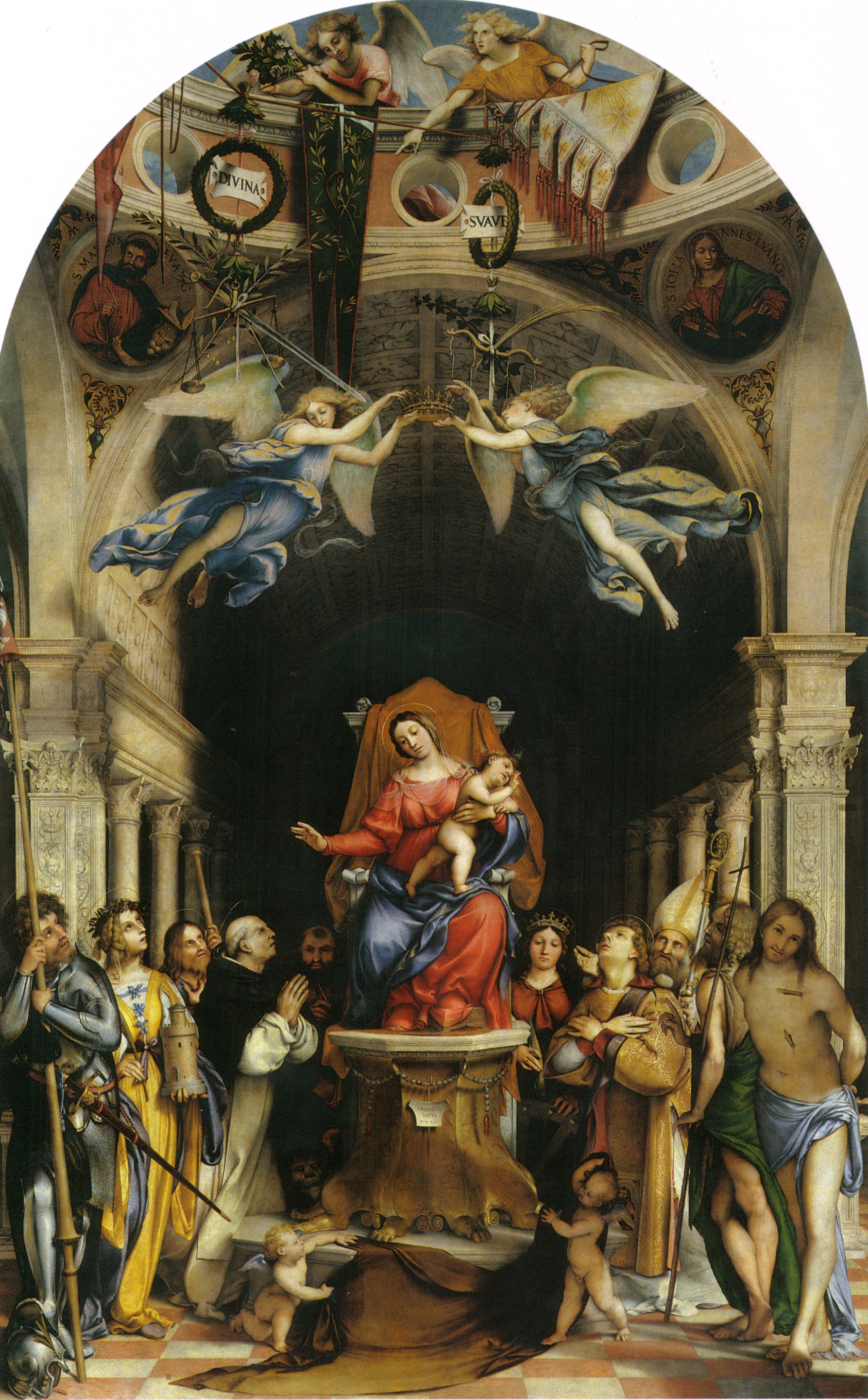 Altarpolyptychon von San Bartolomeo in Bergamo: Haupttafel: links: Alexander von Bergamo, Barbara, Rochus, Dominikus, Markus, rechts: Katharina, Stephan, Augustinus, Johannes der Täufer, Sebastian